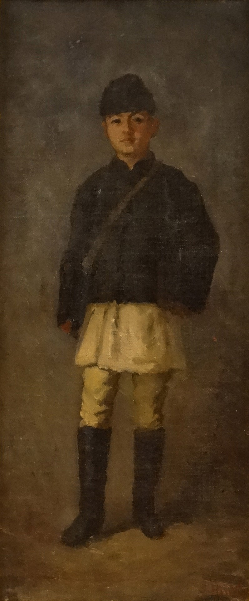 Elevul